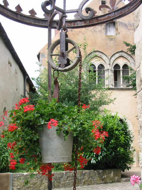 Grange aux dîmes seigneuriales, du XIIIe siècle, à Mennetou-sur-Cher (Loir-et-Cher, France). It is indexed in the Base Mérimée, a database of architectural heritage maintained by the French Ministry of Culture, under the references PA00098479 and IA00012759.